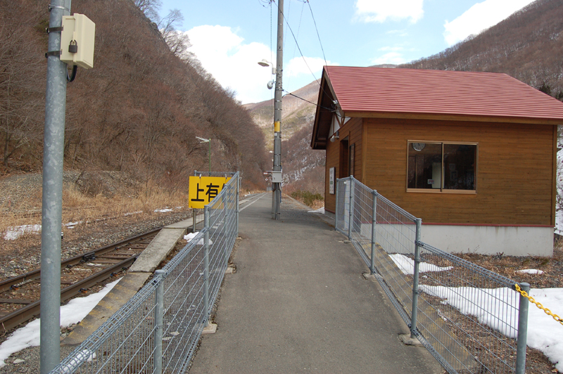 上有住駅(ホームより撮影)